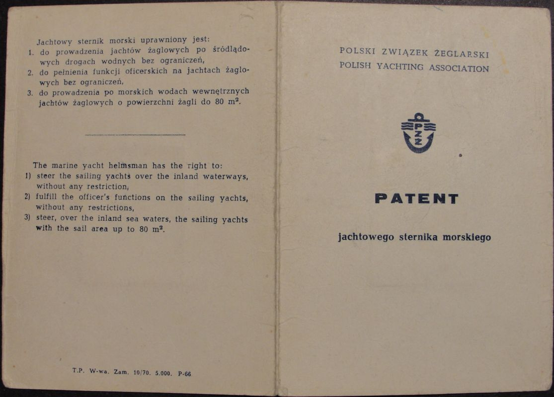 Patent j.st.m. obowiązujący od 01.01.1970 - okładka